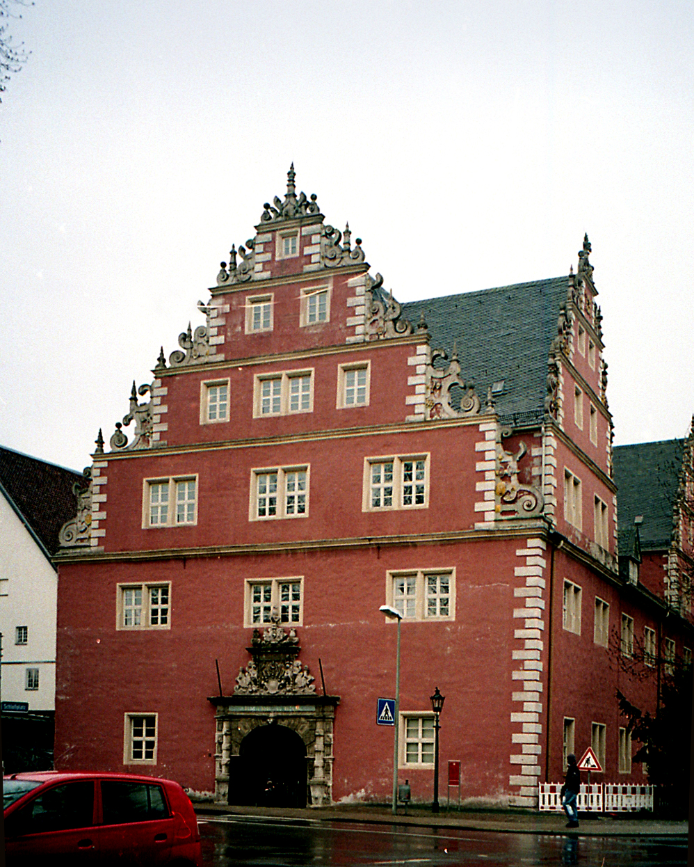 Zeughaus Wolfenbüttel